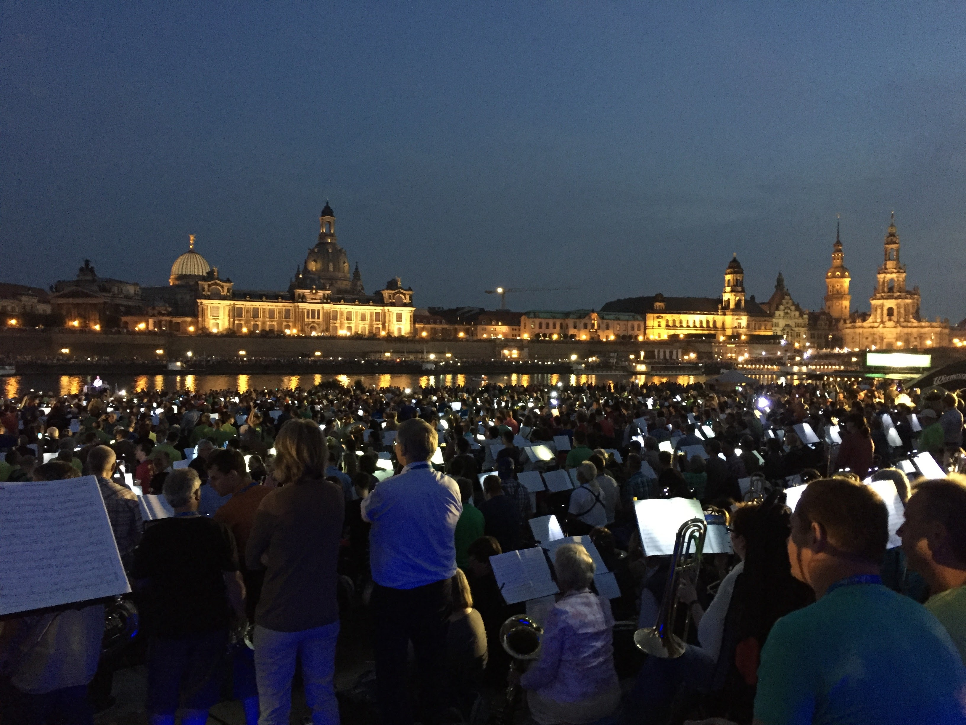 Serenade zum DEPT 2016 in Dresden